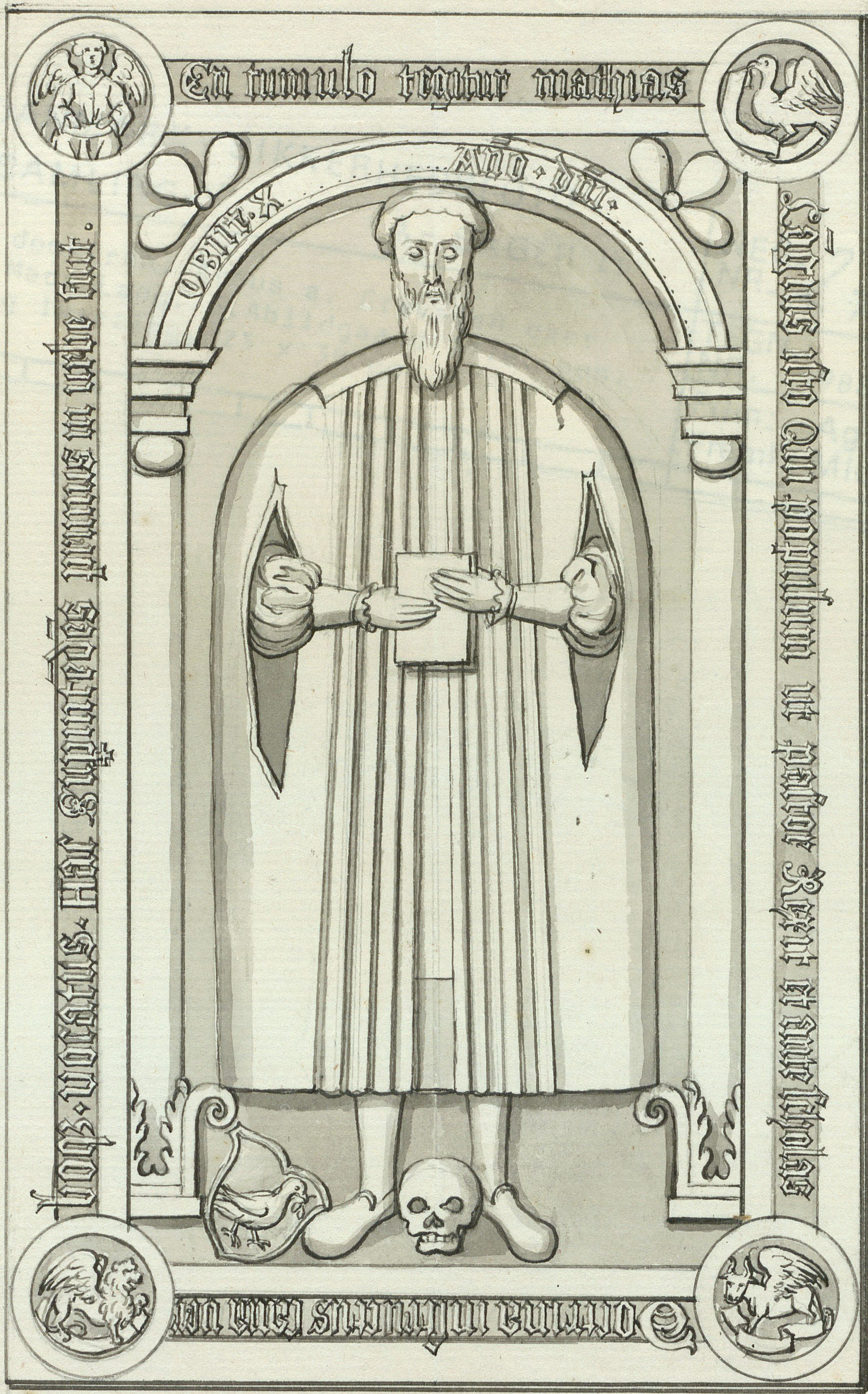 Denne Gravsteen o.1557 , som er af graa Marmor over Mads Lang, †1557, superintendent (biskop), ligger i Aarhuus Domkirkes Lectorio, den er meget forslidt, og inscriptionen nesten ukiendelig, i den bueformede Strimle over Billedets Hoved var Skriften saaledes afslidt, at der af ikke kunde kiendes mere, end hvad Tegningen udviiser, hvoraf kan skiønnes, at der har staaet Aar og Dag, da han døde. S: Abildgaard. A(nn)o 1770. 25 x 39 cm